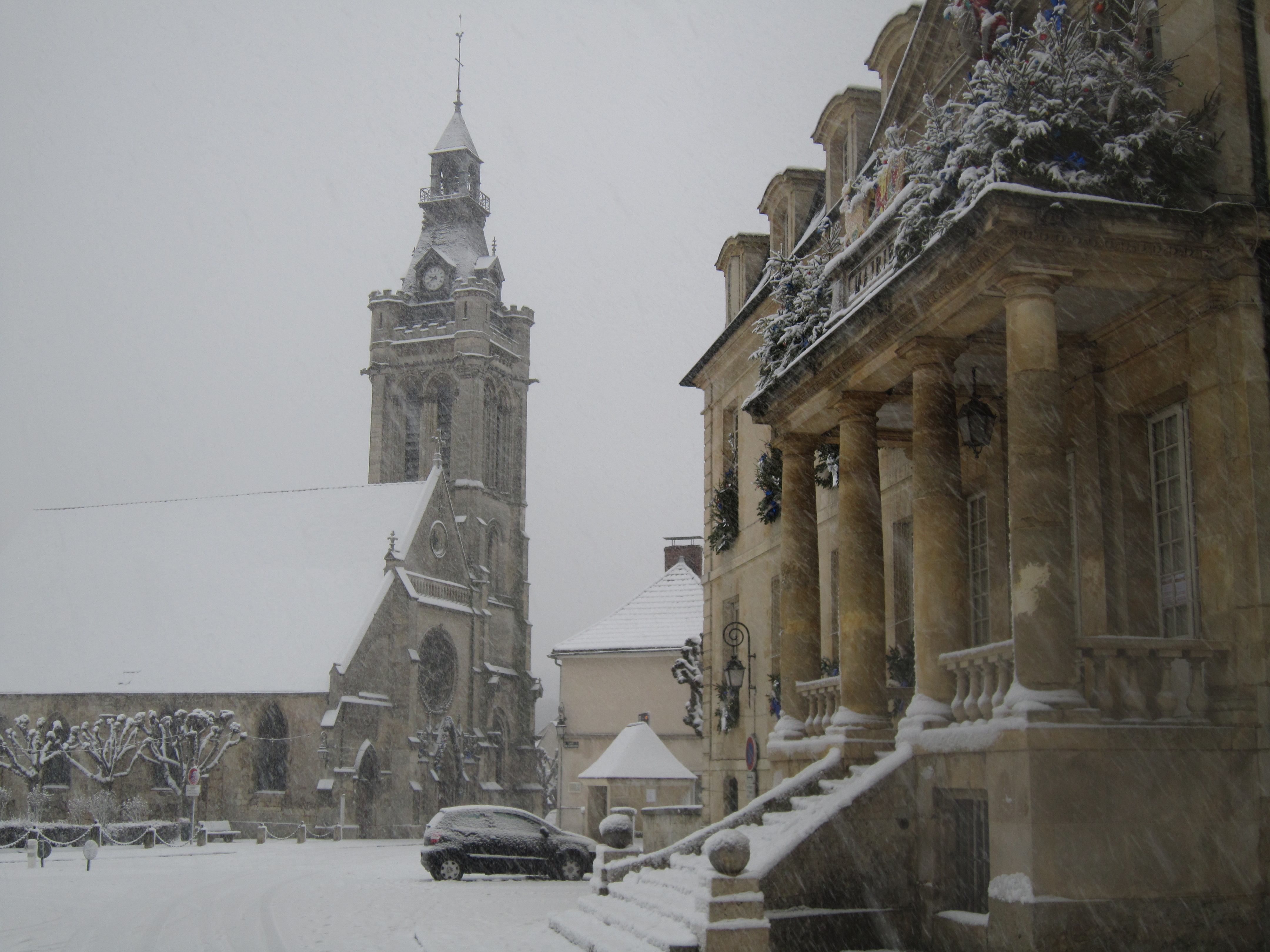 Mairie et église de Viarmes